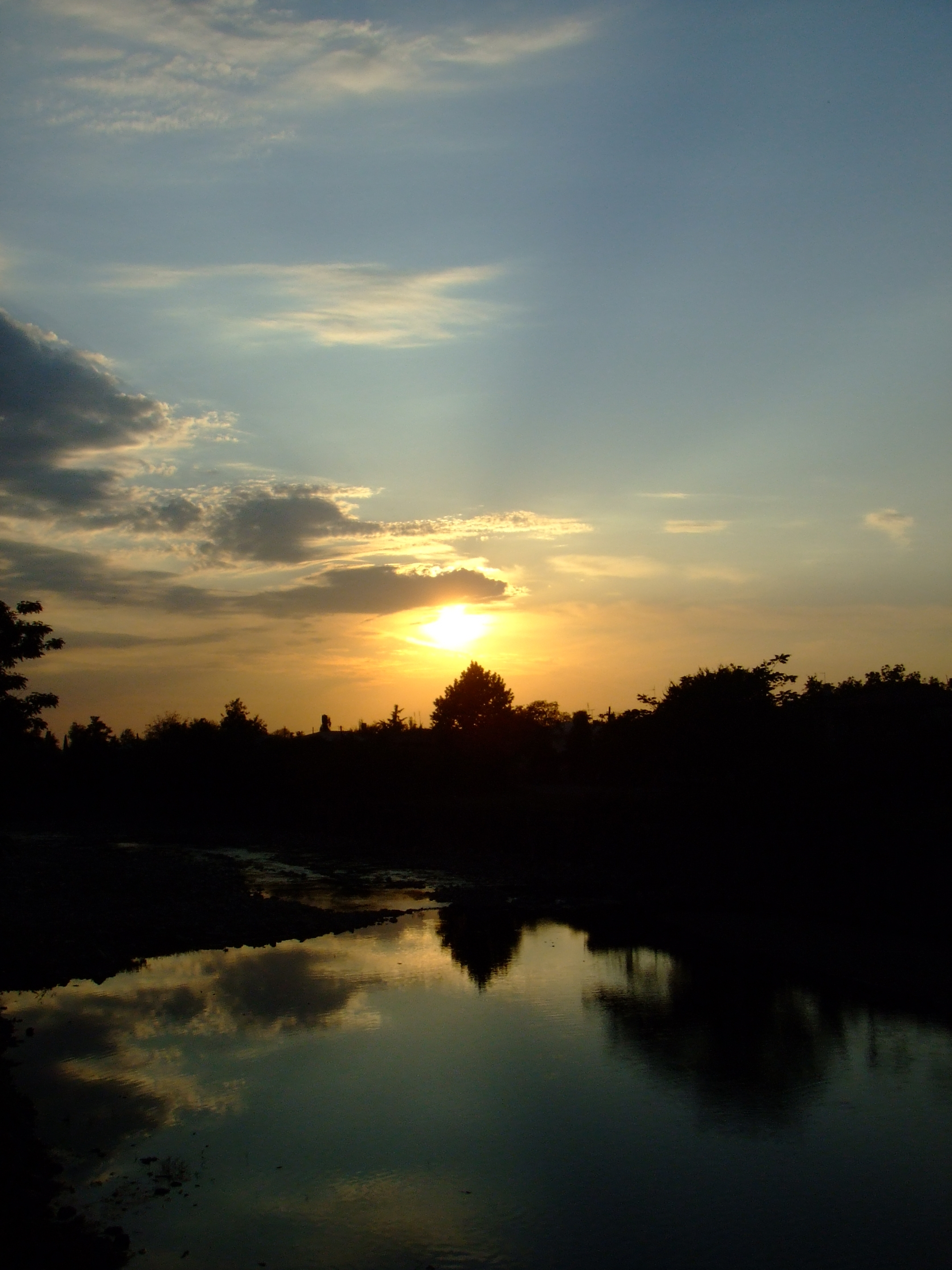 მდინარე ჩხოუში, ზუგდიდი